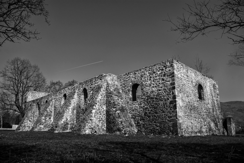 Kostel sv. Prokopa, zřícenina (Krupka), při silnici z Bohosudova na Teplice, Krupka